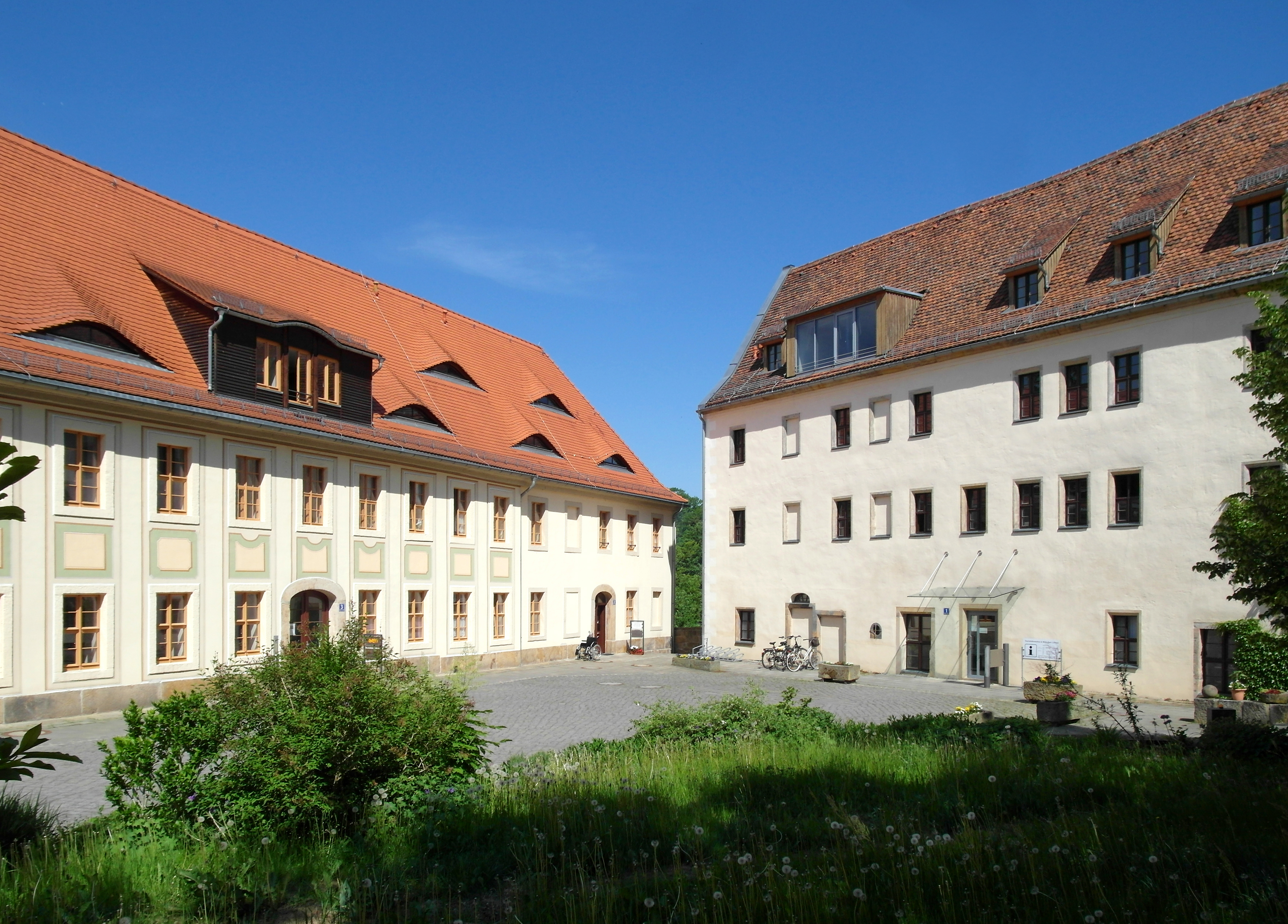 14.05.2018 01847 Lohmen, Schloßstraße 1 (GMP: 50.990512,13.994204): Schloß Lohmen. 1567 schenkte Kurfürst August den Herrensitz seinem Kammersekretär Hans Jenitz. Dieser scheint den Neubau des Schlosses in die Wege geleitet zu haben. Eine wiederentdeckte Inschrift auf der Hofseite nennt die Jahreszahl 1568. Einige Jahre nach der Wende wurde das einsturzgefährdete Schloß wurde umfassend saniert und im Mai 2001 wiedereröffnet. Es wird heute u.a. als Gemeindeamt genutzt. Ansicht Hofseite (Süden). [SAM6100.JPG]20180514145DR.JPG(c)Blobelt